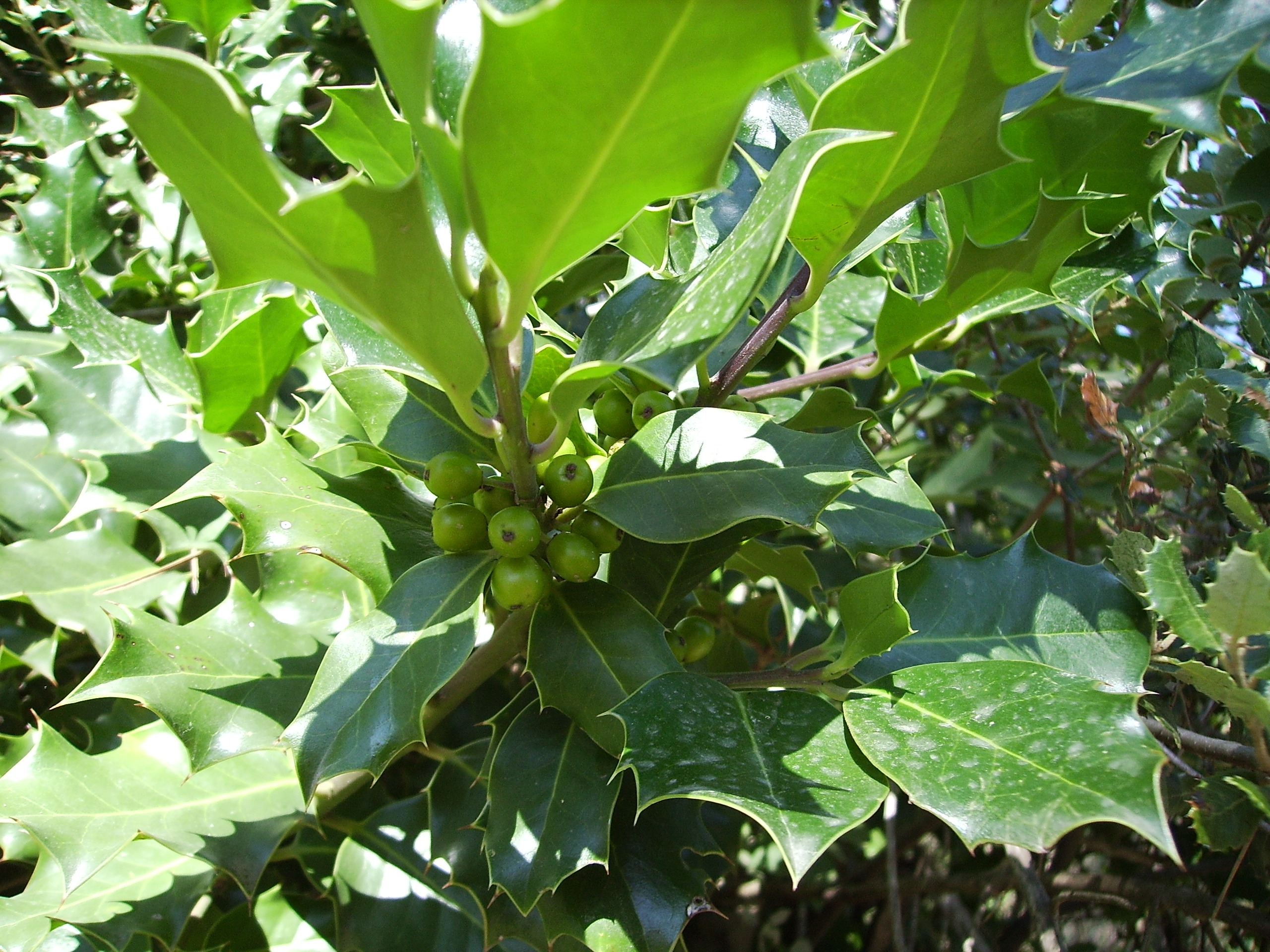 Image:Ilex aquifolium,Grèvol_29_i_30_juliol_06_011.jpg Ilex aquifolium Inmature fruits in july of Ilex aquifolium (grèvol) at Castelltallat, Catalonia